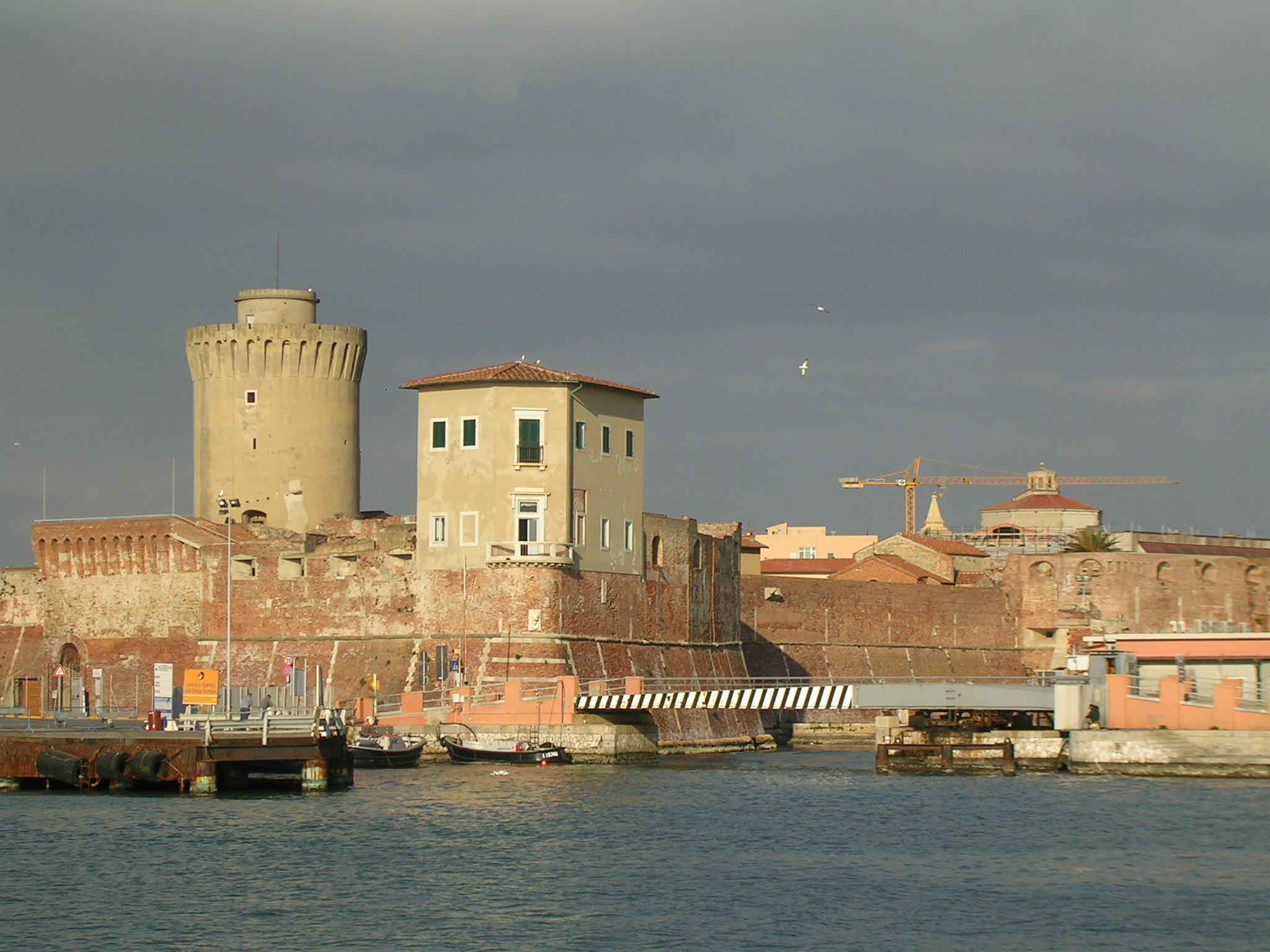 Livorno: la Fortezza Vecchia col bastione della Canaviglia.